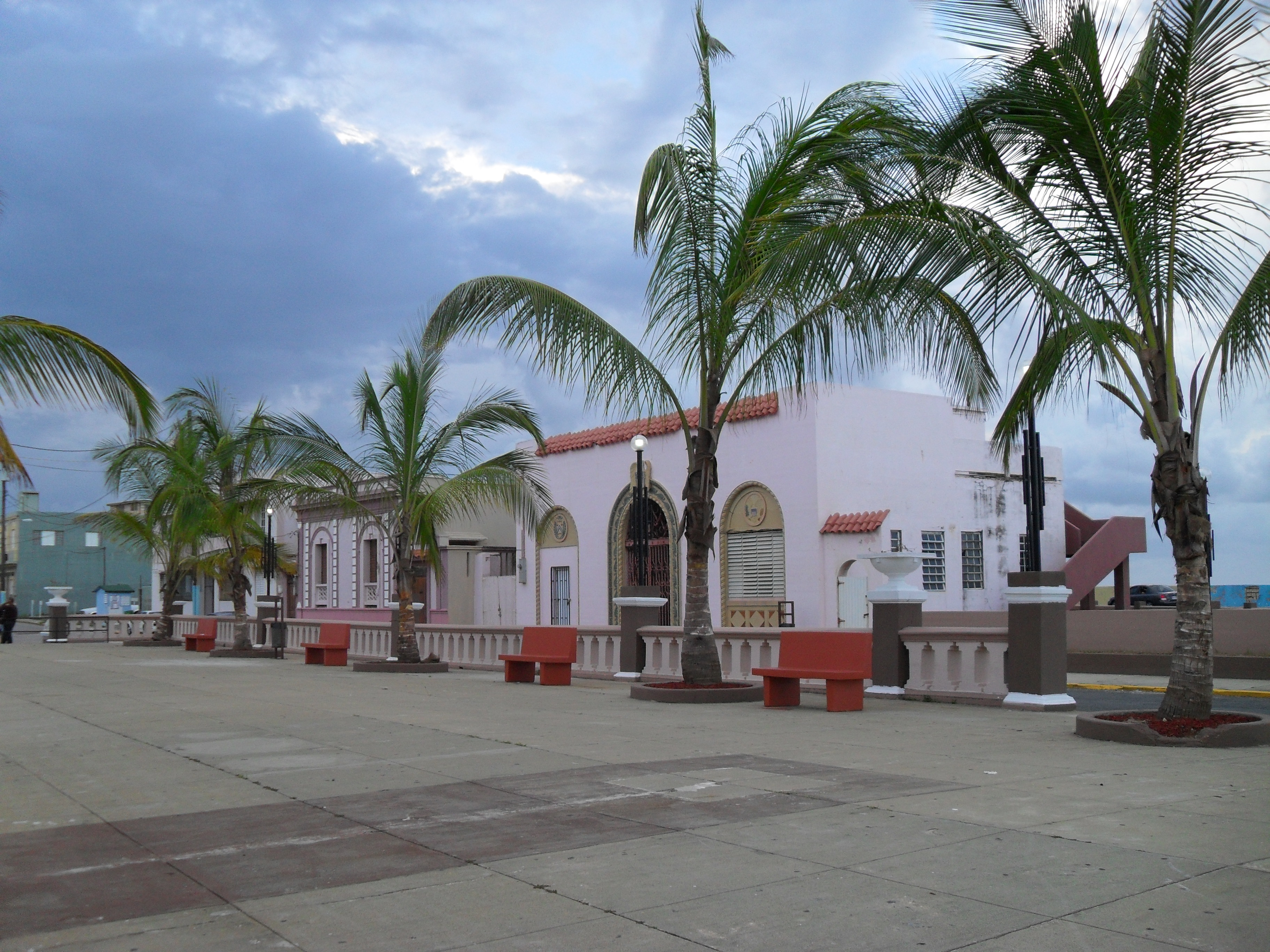 Plaza Colon, Arecibo, Puerto Rico